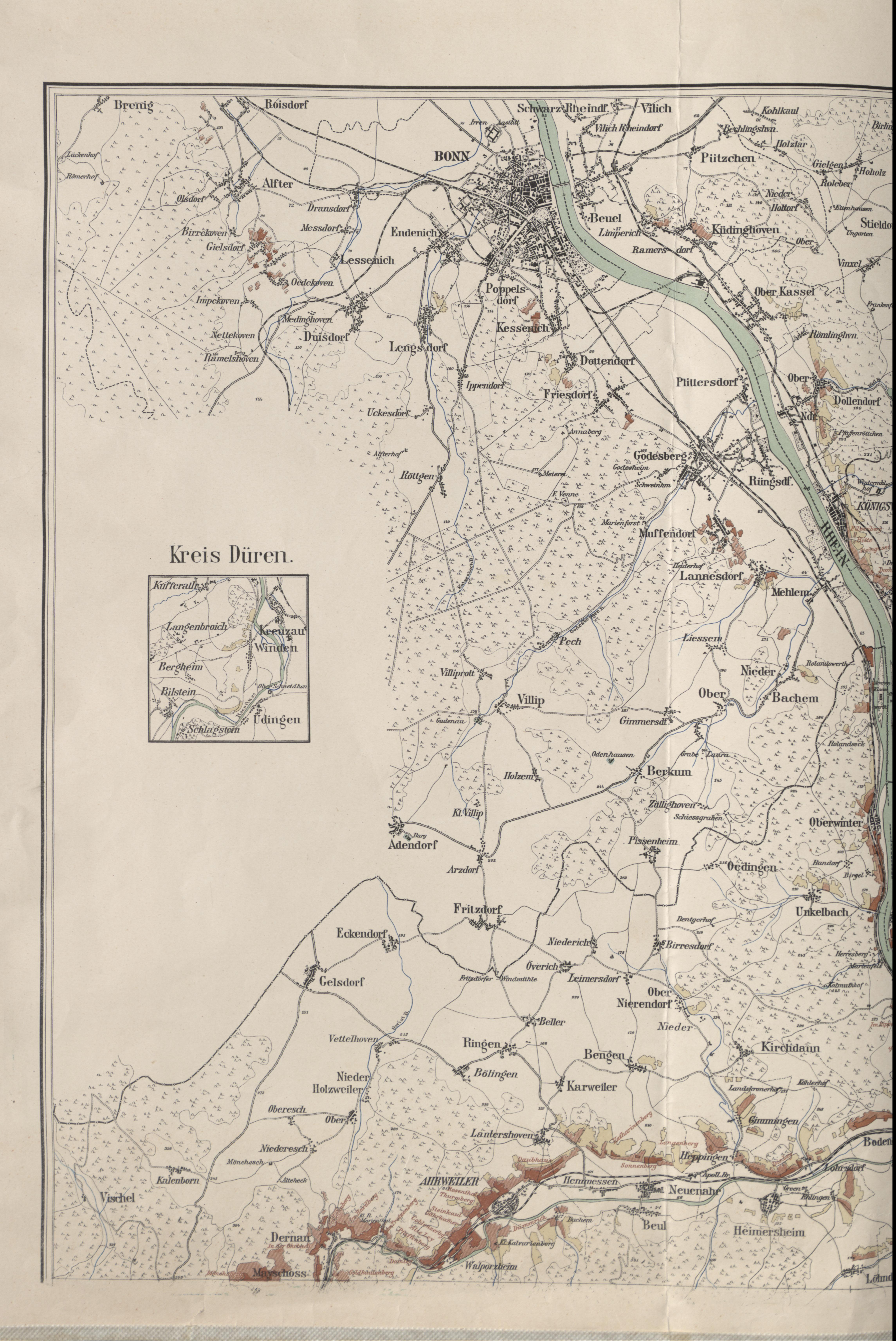 Koblenz : 1904; [Electronic ed.] Koblenz : Landesbibliothekszentrum Rheinland-Pfalz, 2010.